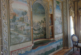 Аҧсшәа: murals